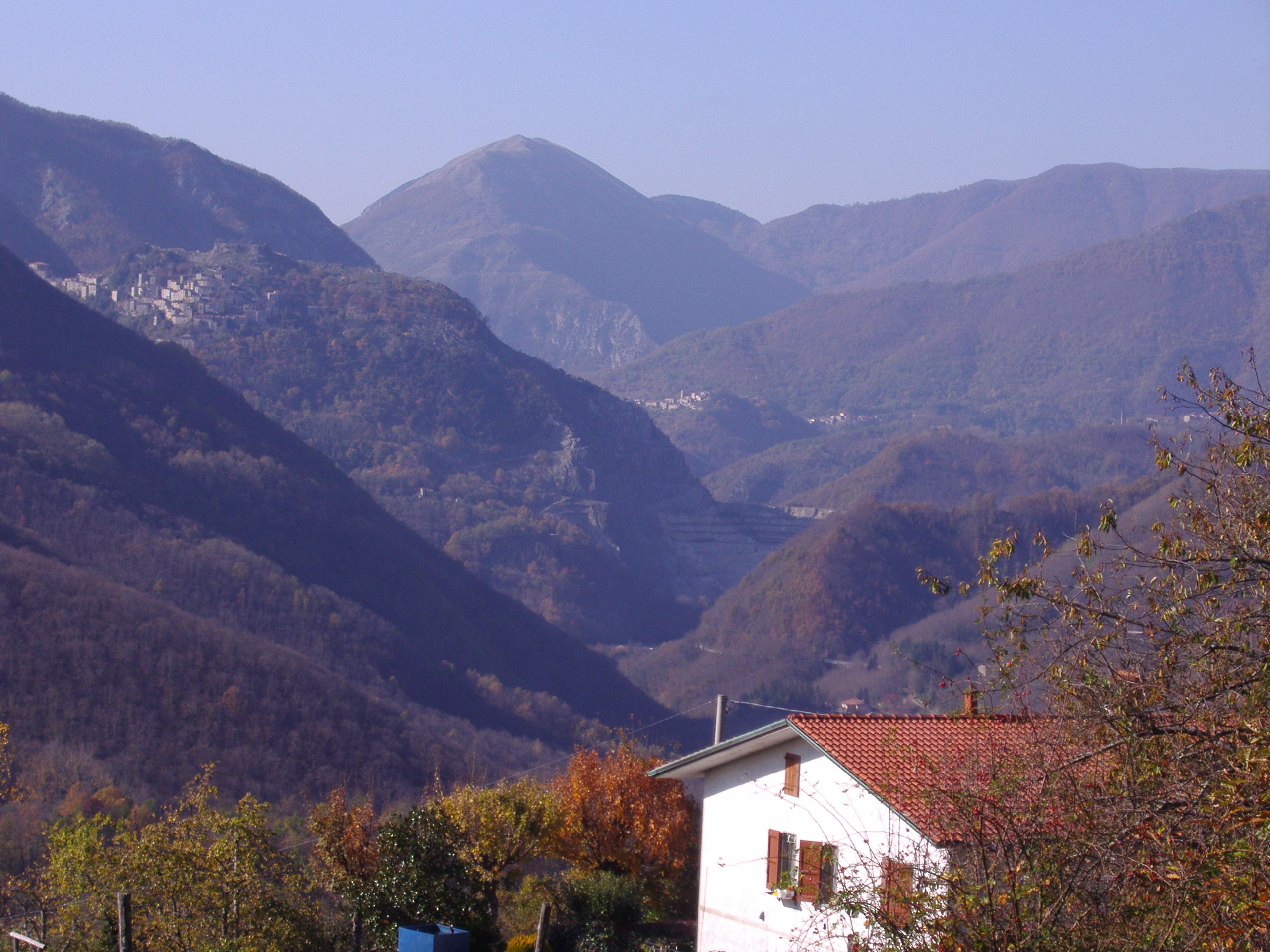 Veduta della Val di Lima presso Lucchio e Tana Termini dalla località Lolle di Piteglio